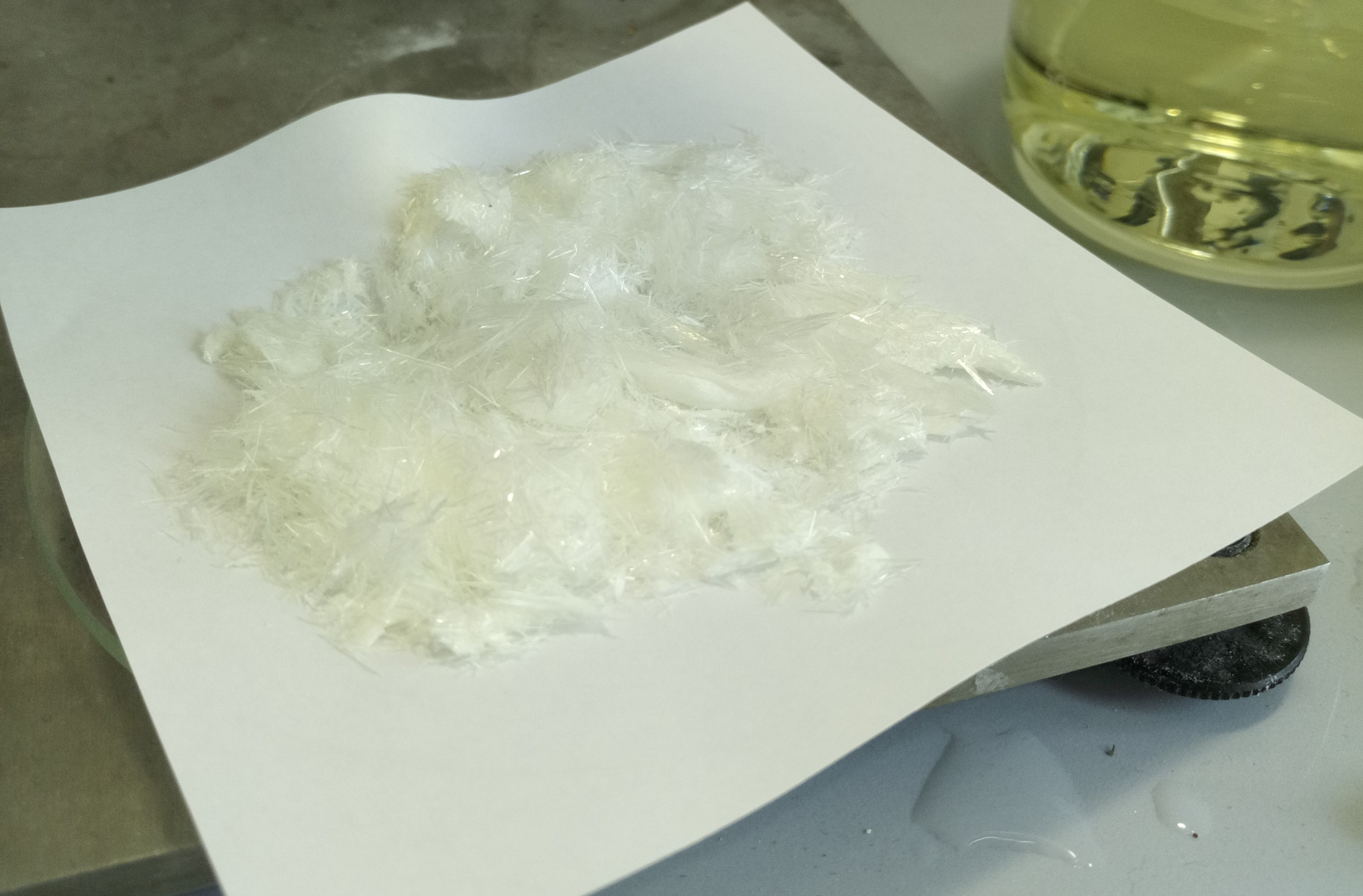 TNT Crystals